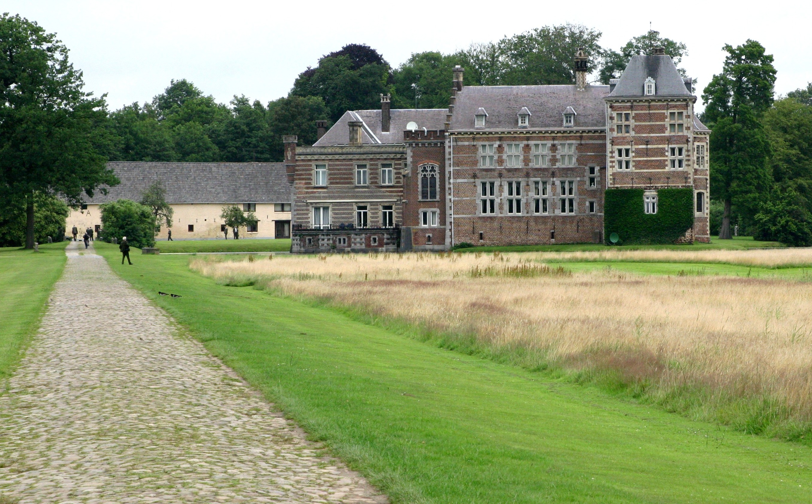 D'Schlass Vogelsanck. Kategorie:Provënz Limburg